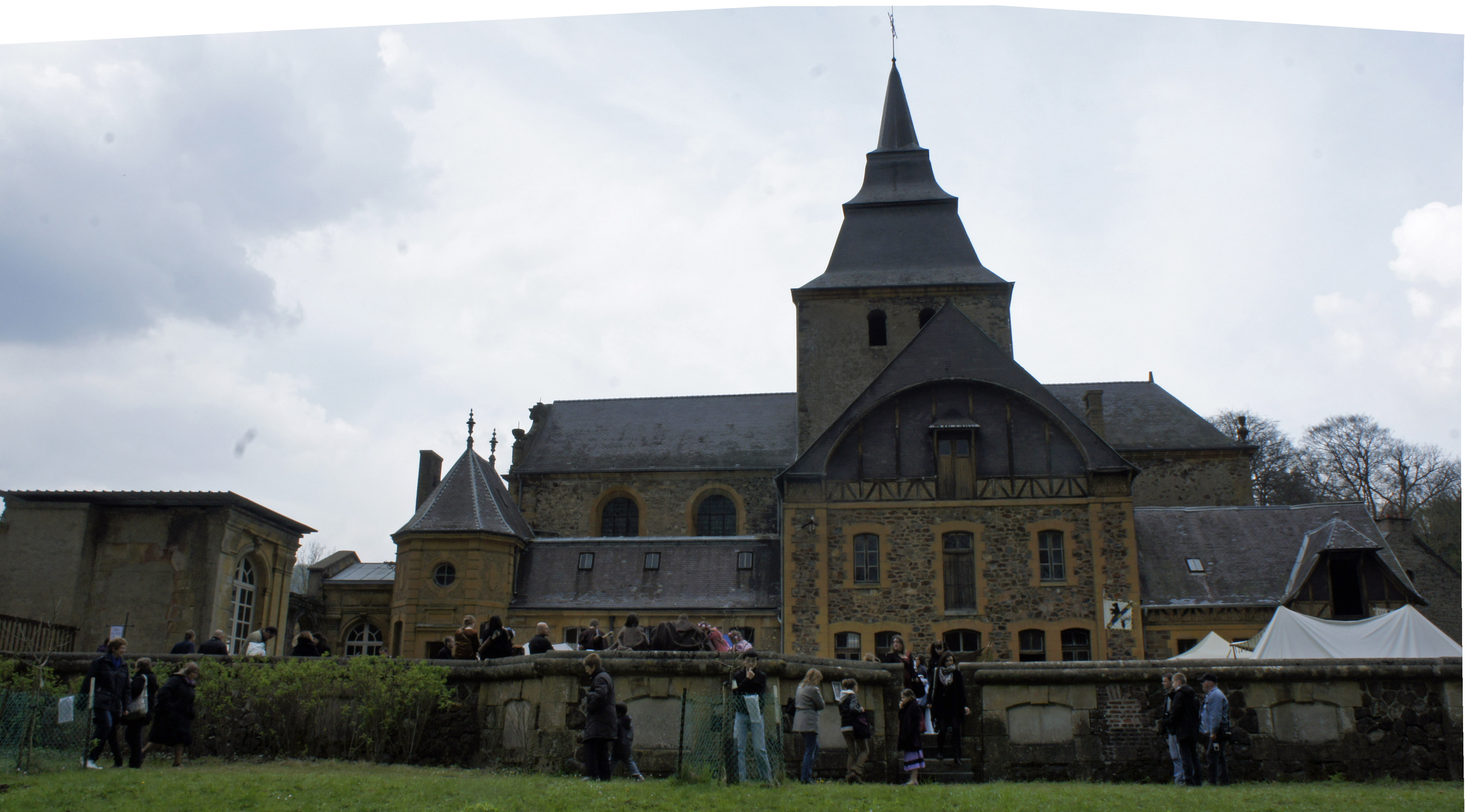 Abbaye de Laval Dieu vue depuis le jardin longeant la Meuse lors du festival.